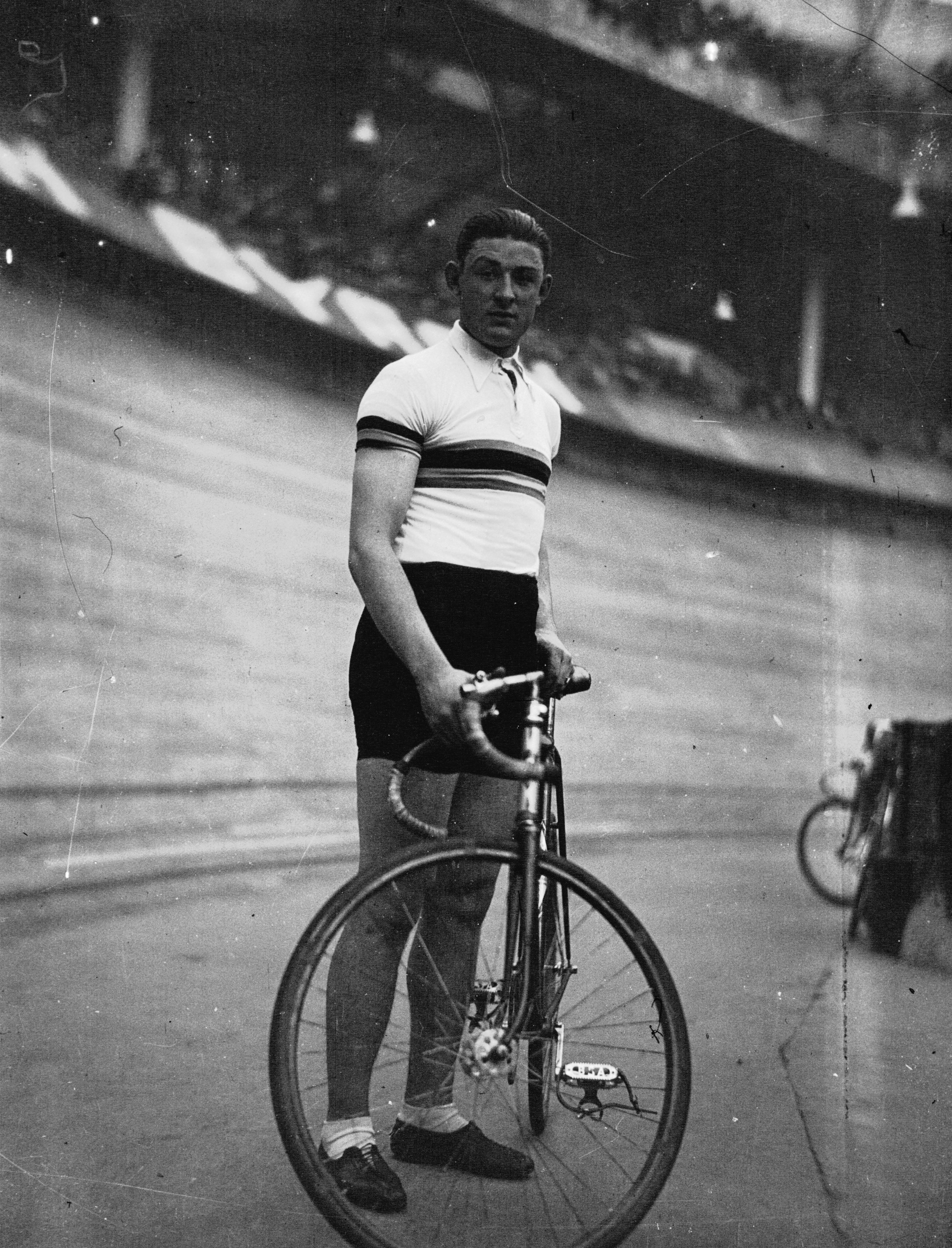 Vel'd'Hiv'- Karel Kaers debout avec son vélo -1934